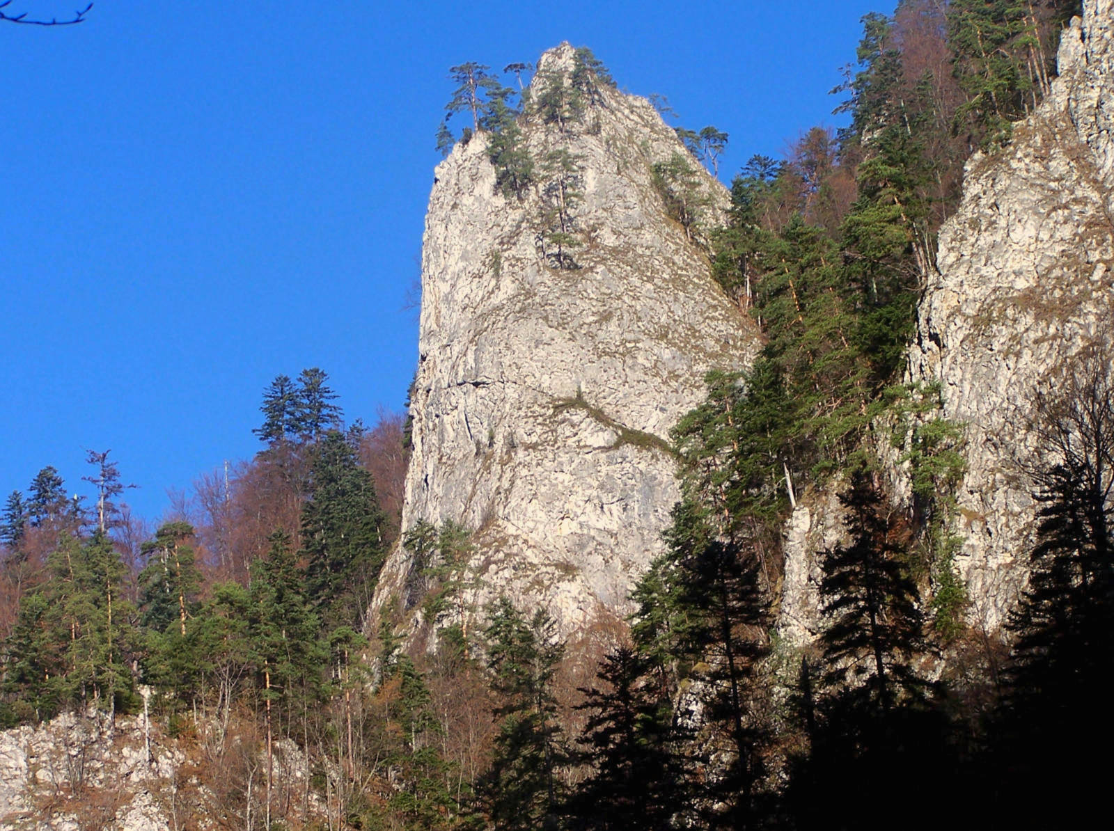 Cukrowa Głowa pod Sokolicą